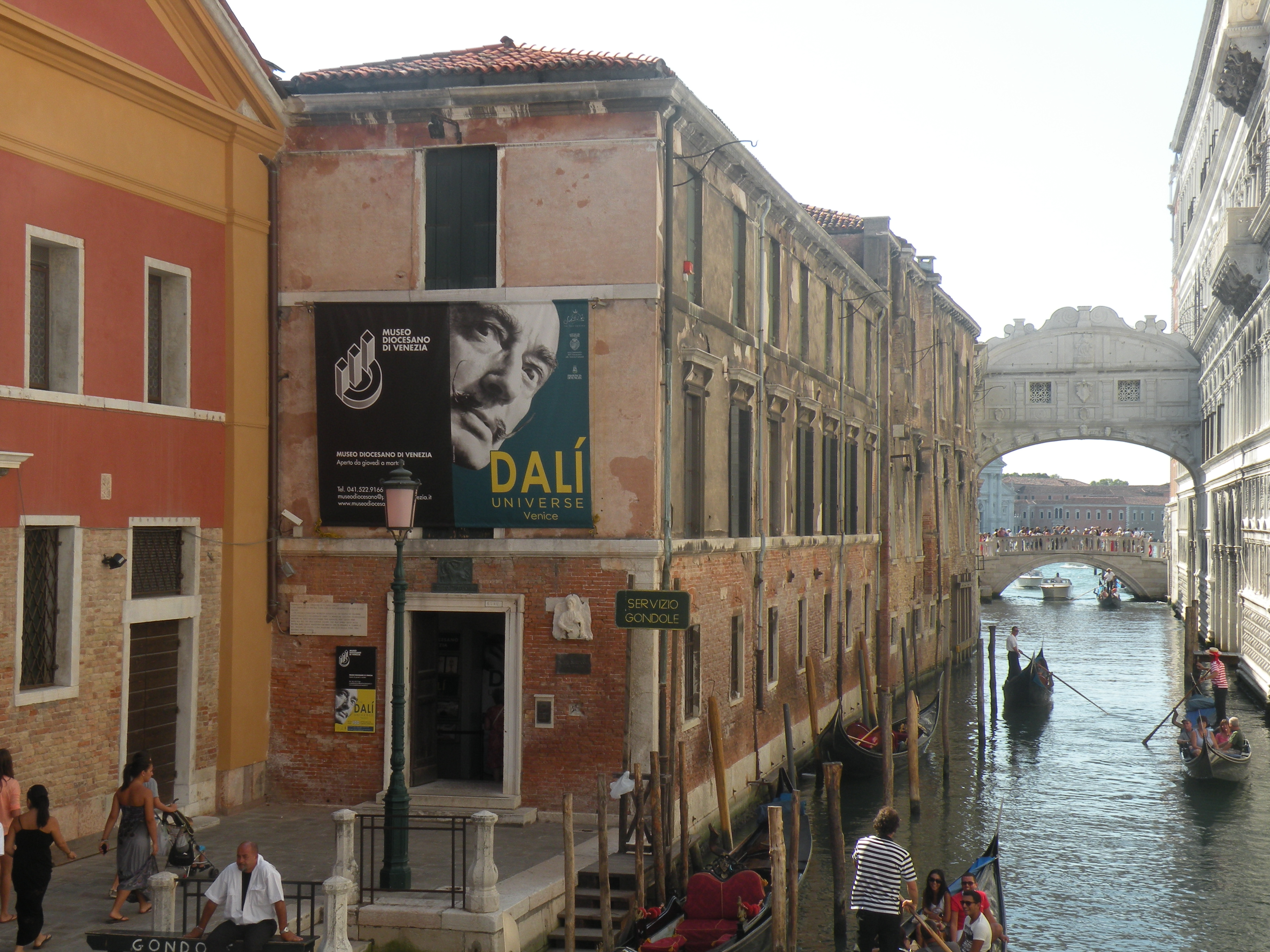 Museo diocesano d'arte sacra in Venice, Italy